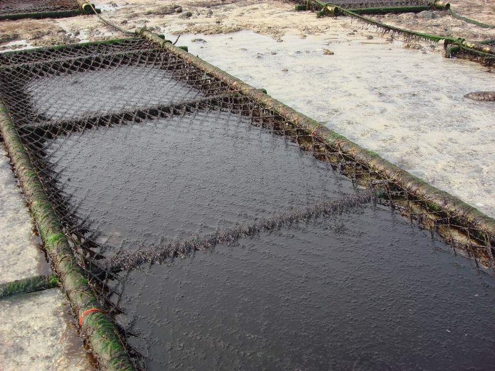 紫菜野放養殖筏